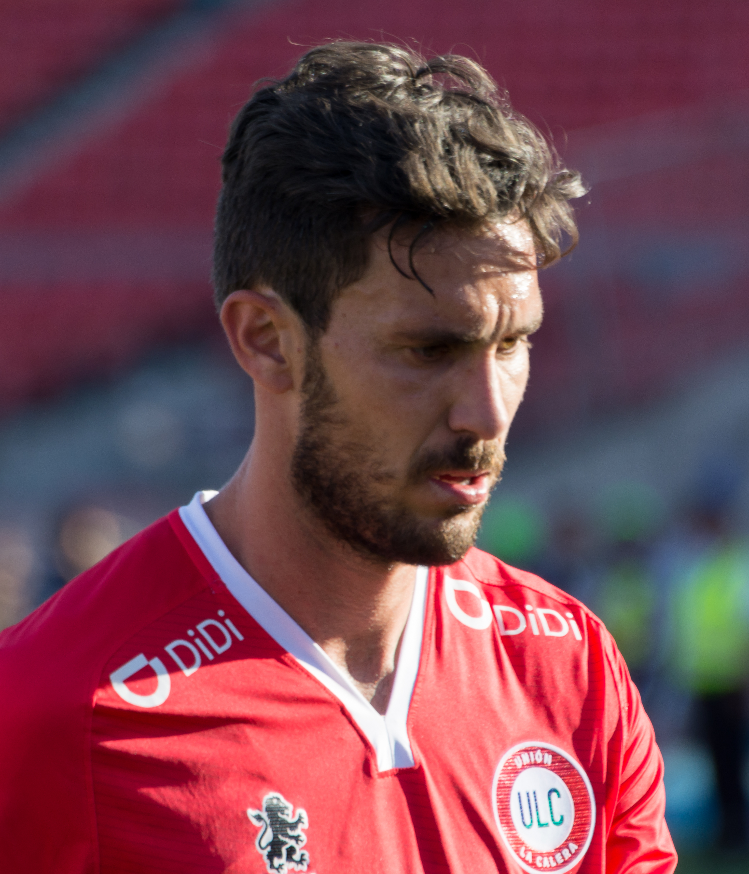 Universidad de Chile v Unión La Calera, Estadio Nacional, Ñuñoa, Santiago, Región Metropolitana, Chile